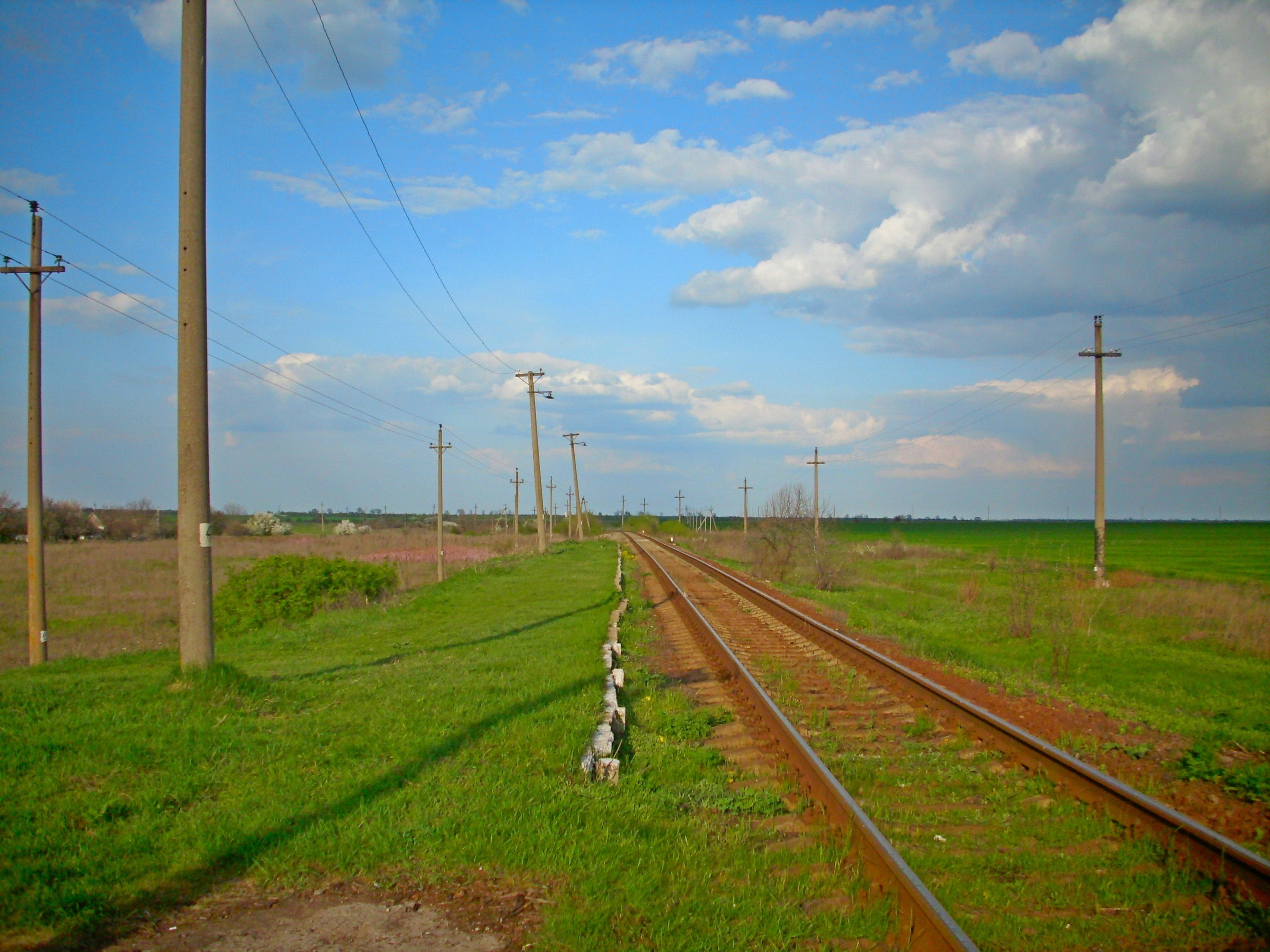 Зупинний пункт 6 км в с. Налівайкове